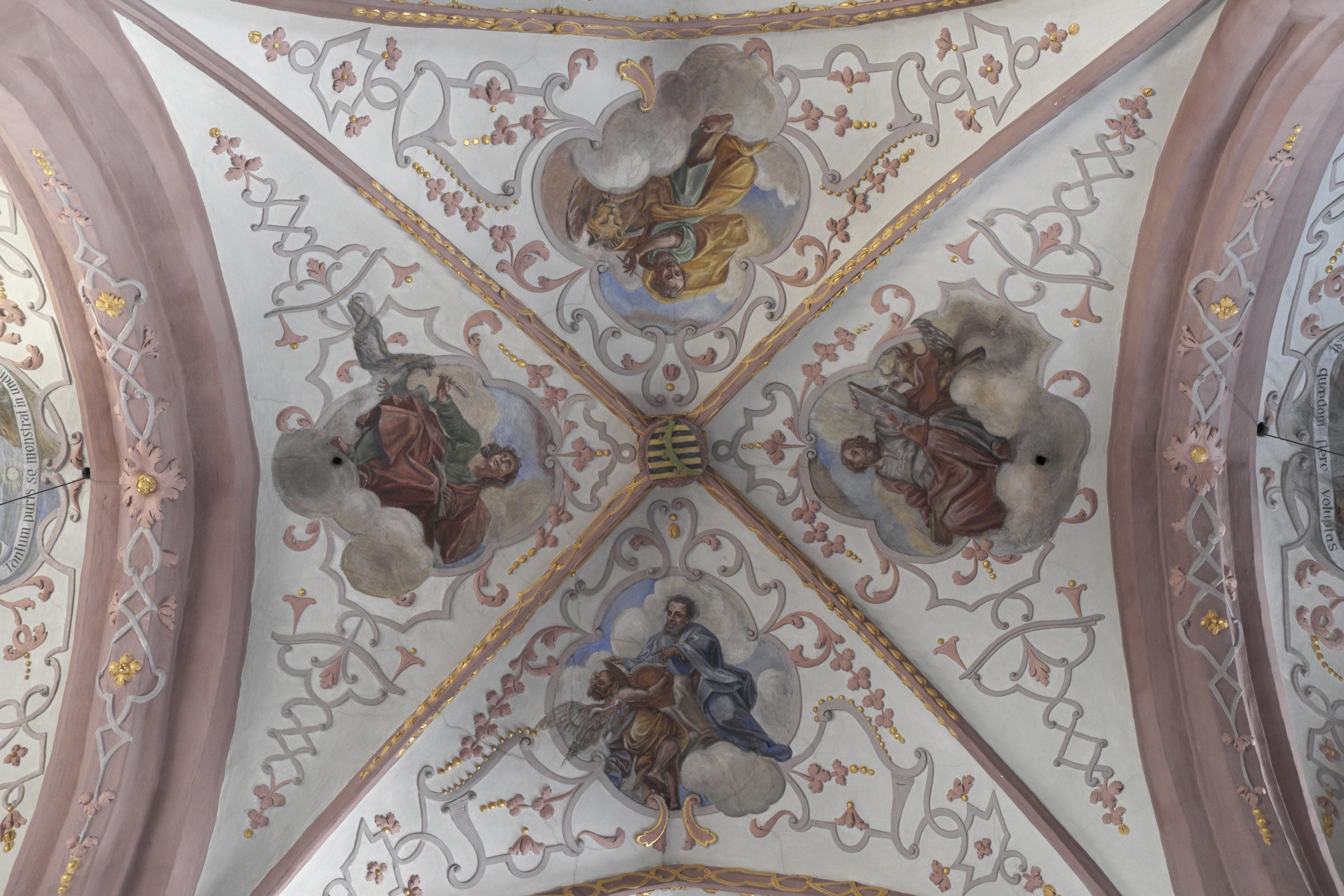 Katholische Spitalkirche Heilig Geist in Ingolstadt (Bayern/Deutschland), Deckenmalerei, Darstellung: Evangelisten mit ihren Symbolen